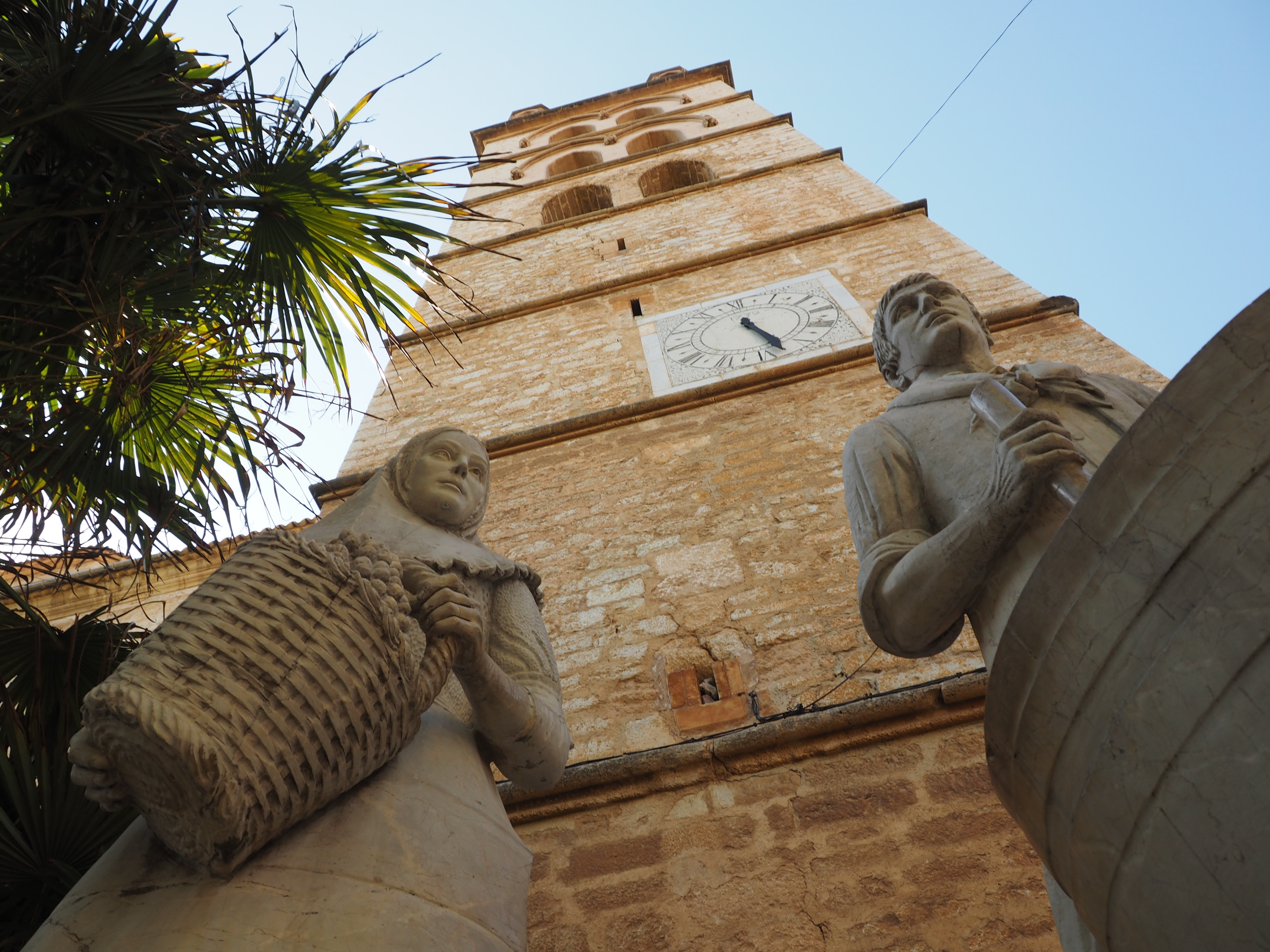 Kirchturm der Església de Santa Maria de Robines, Binissalem, Mallorca